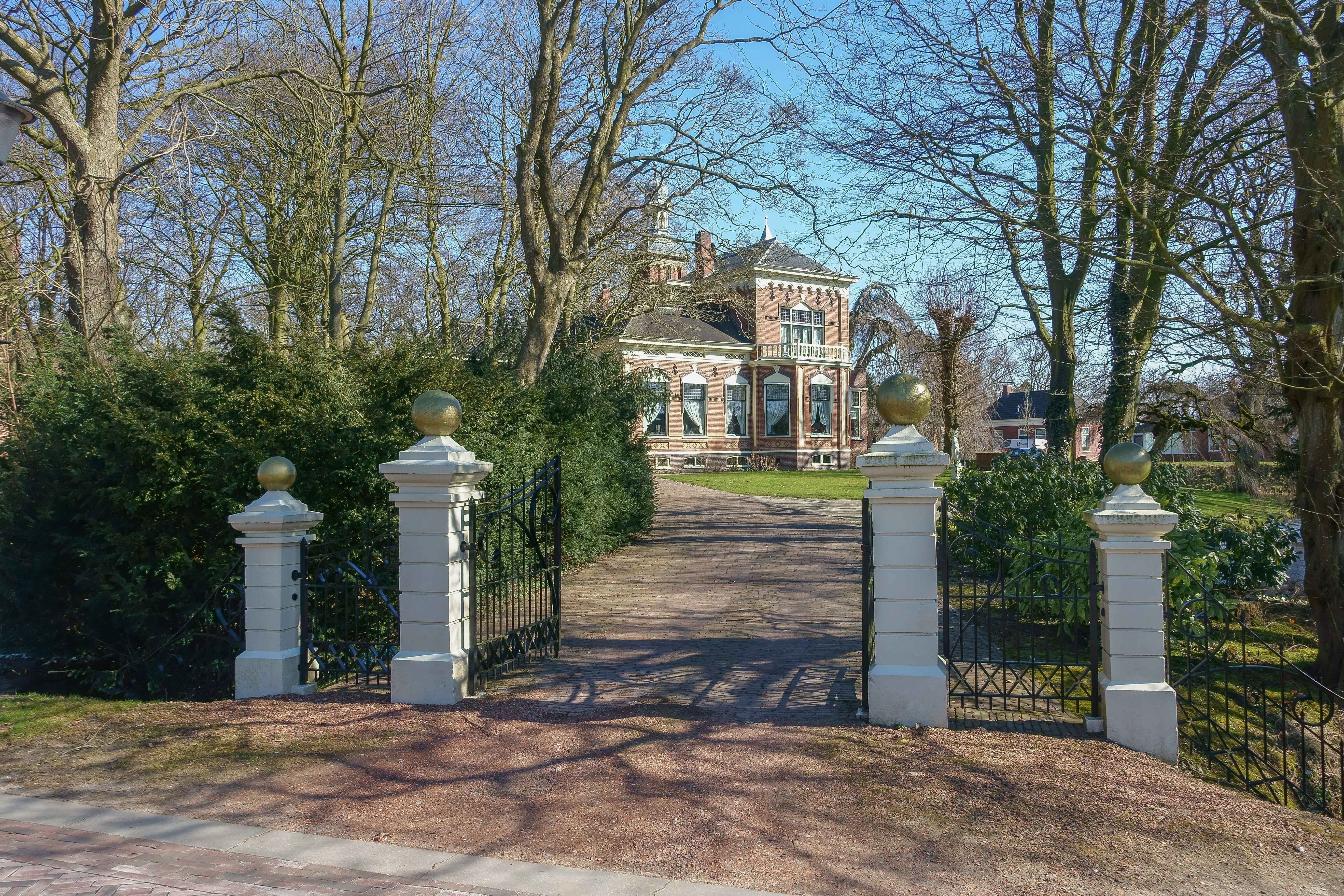 Entree Huize Mentheda Middelstum